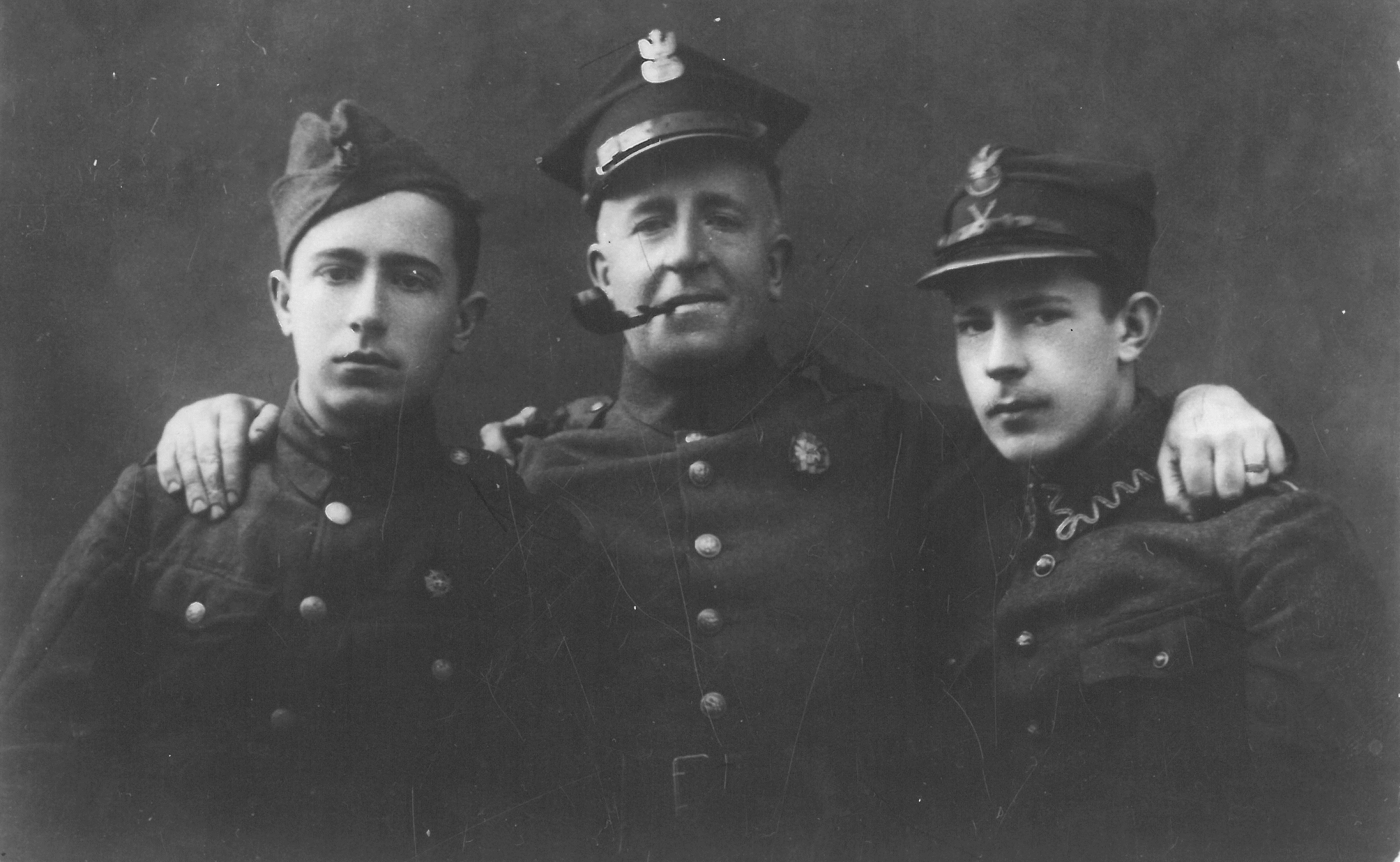 Stanisław Feliks Hiszpański (pośrodku) z dwoma synami, zdjęcie wykonane w ok. 1920 roku